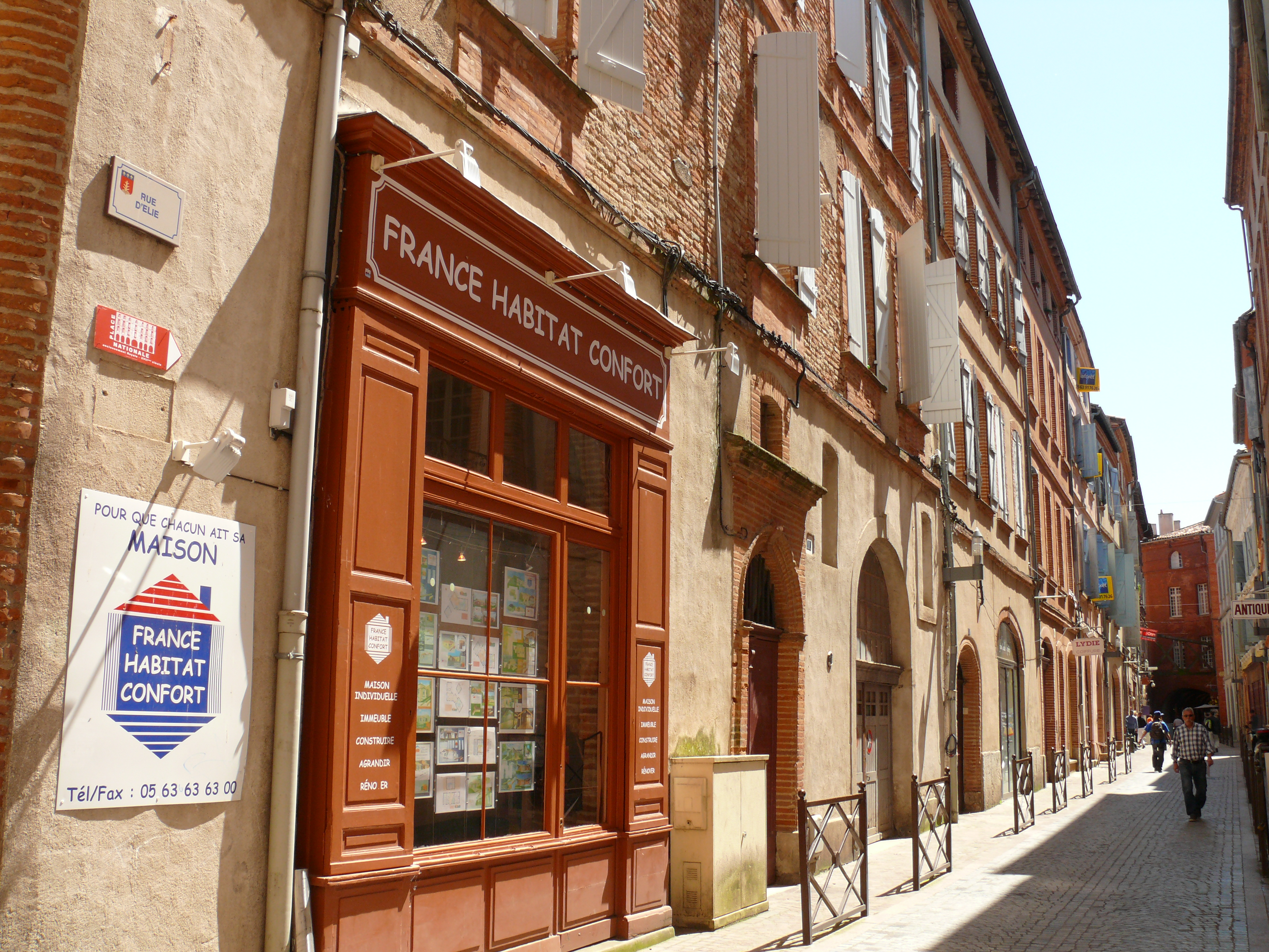 Montauban - Rue d'Élie vue de la rue de la Comédie